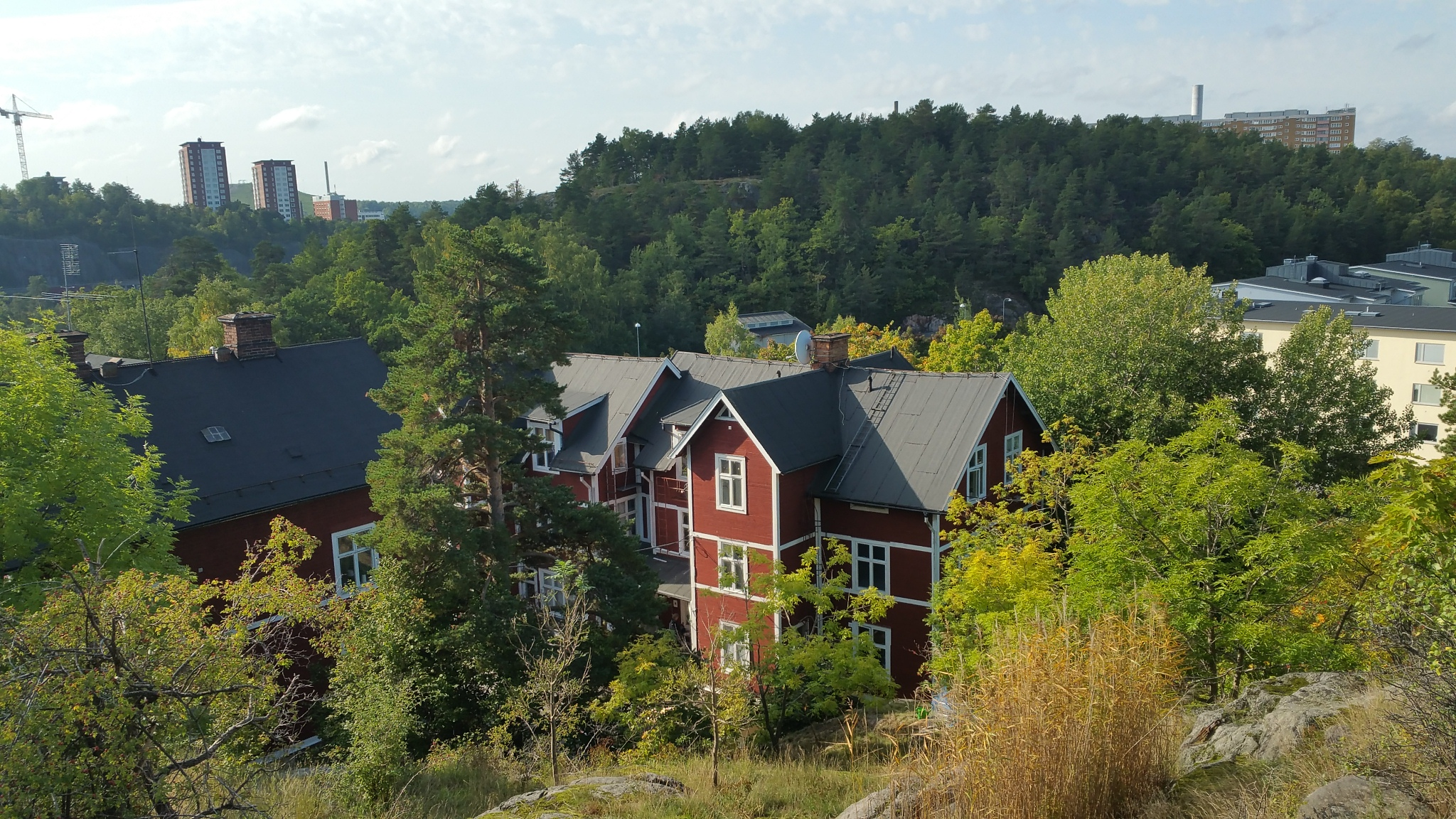 Superfosfatfabrikens trävillor, Alphyddan och Henriksdalsberget med nyckelbiotopen Trolldalen syns från Skatberget på västra Finnberget i Nacka.